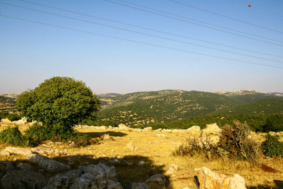 منظر سماوي لغابات برقش في الأردن.